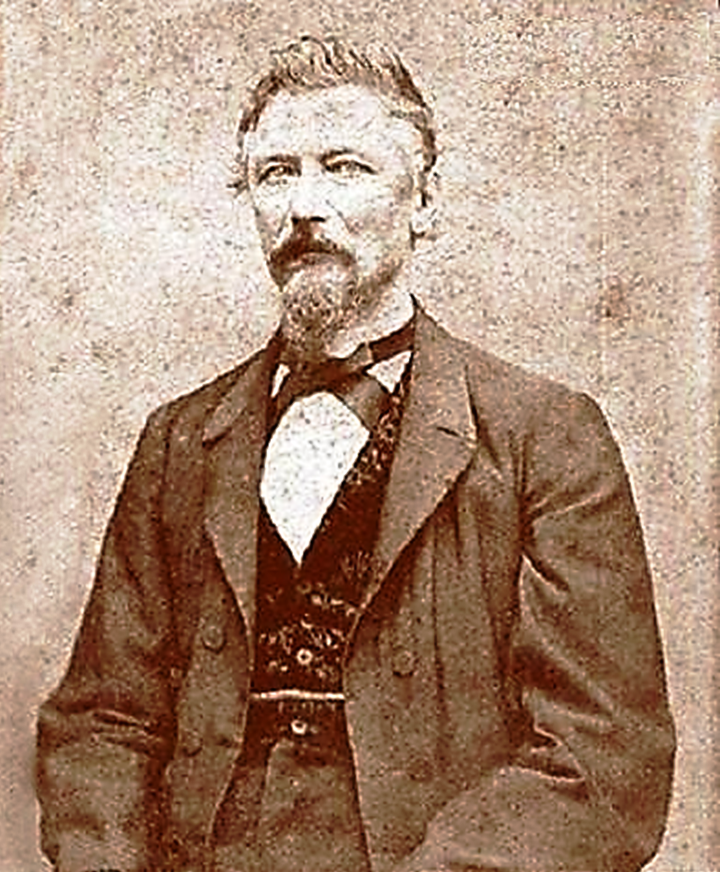 Dr. Gottfried Knoche